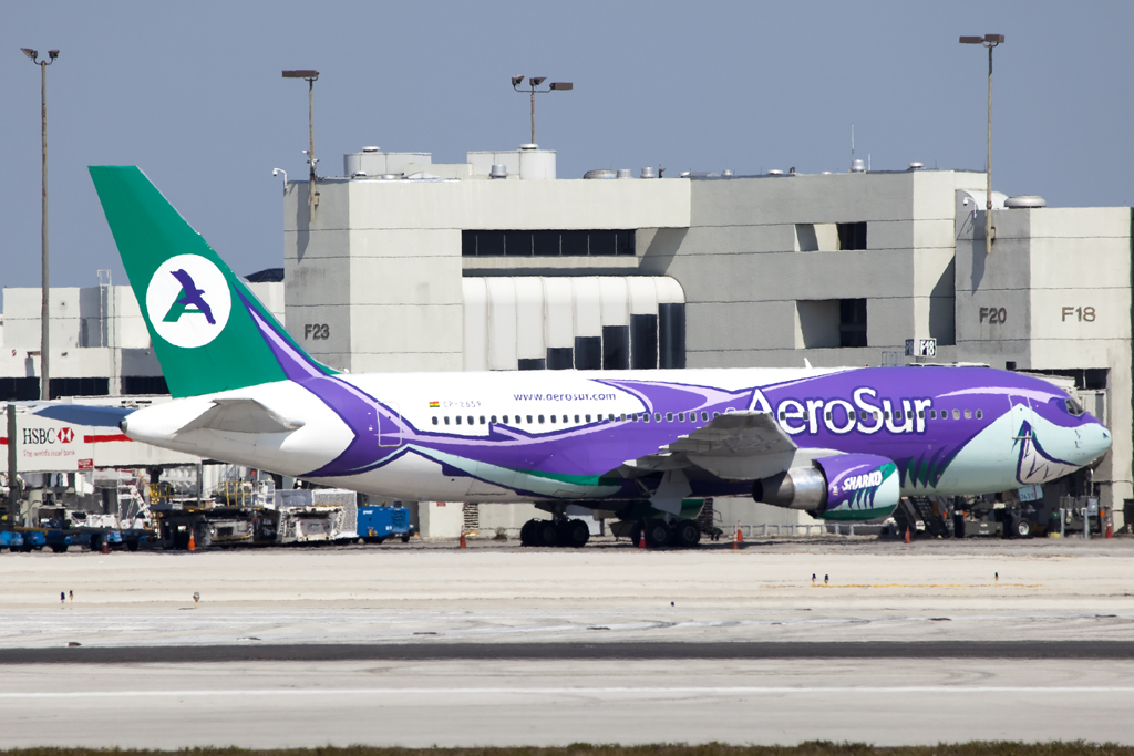 Miami International